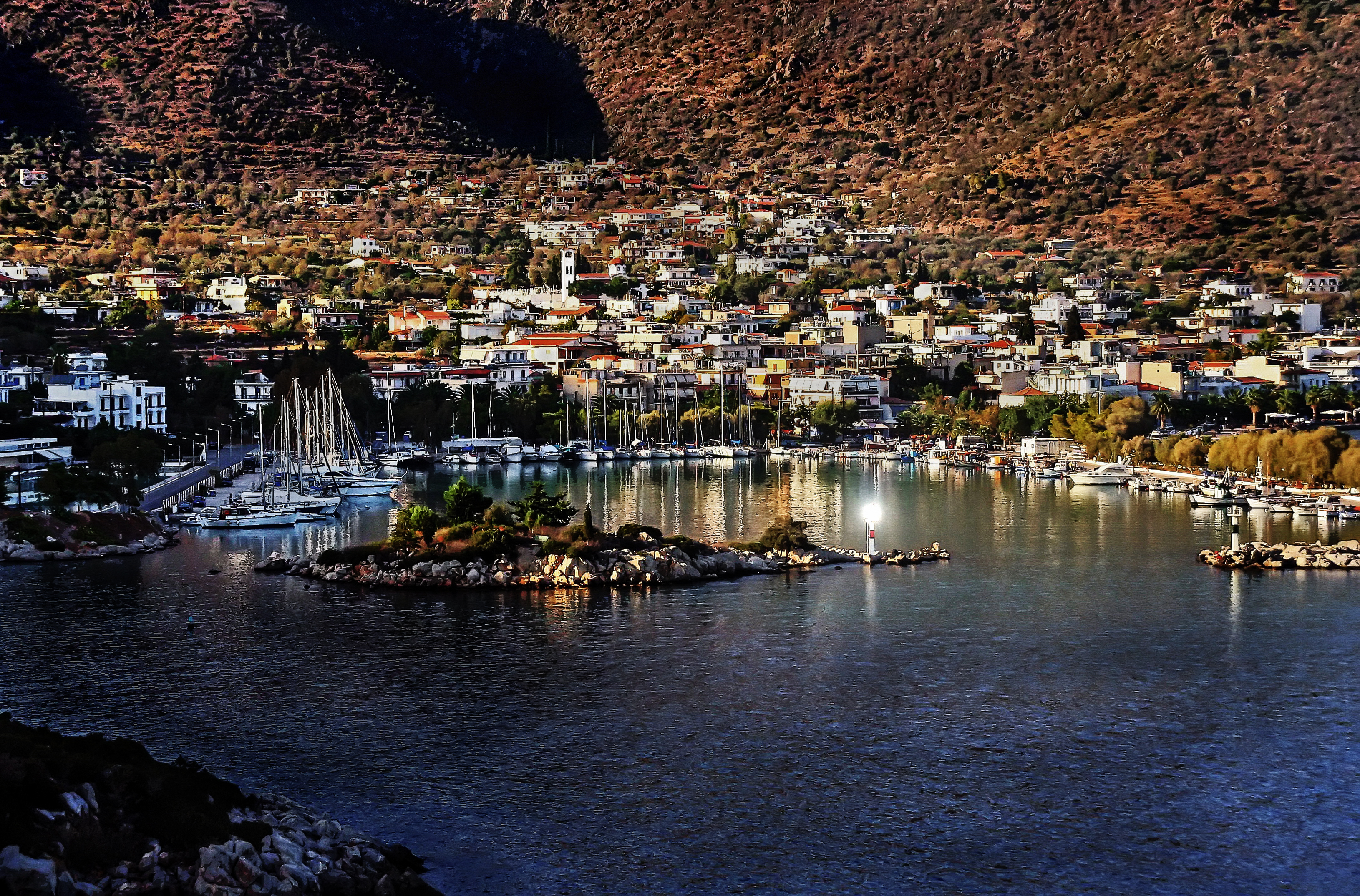 Methana